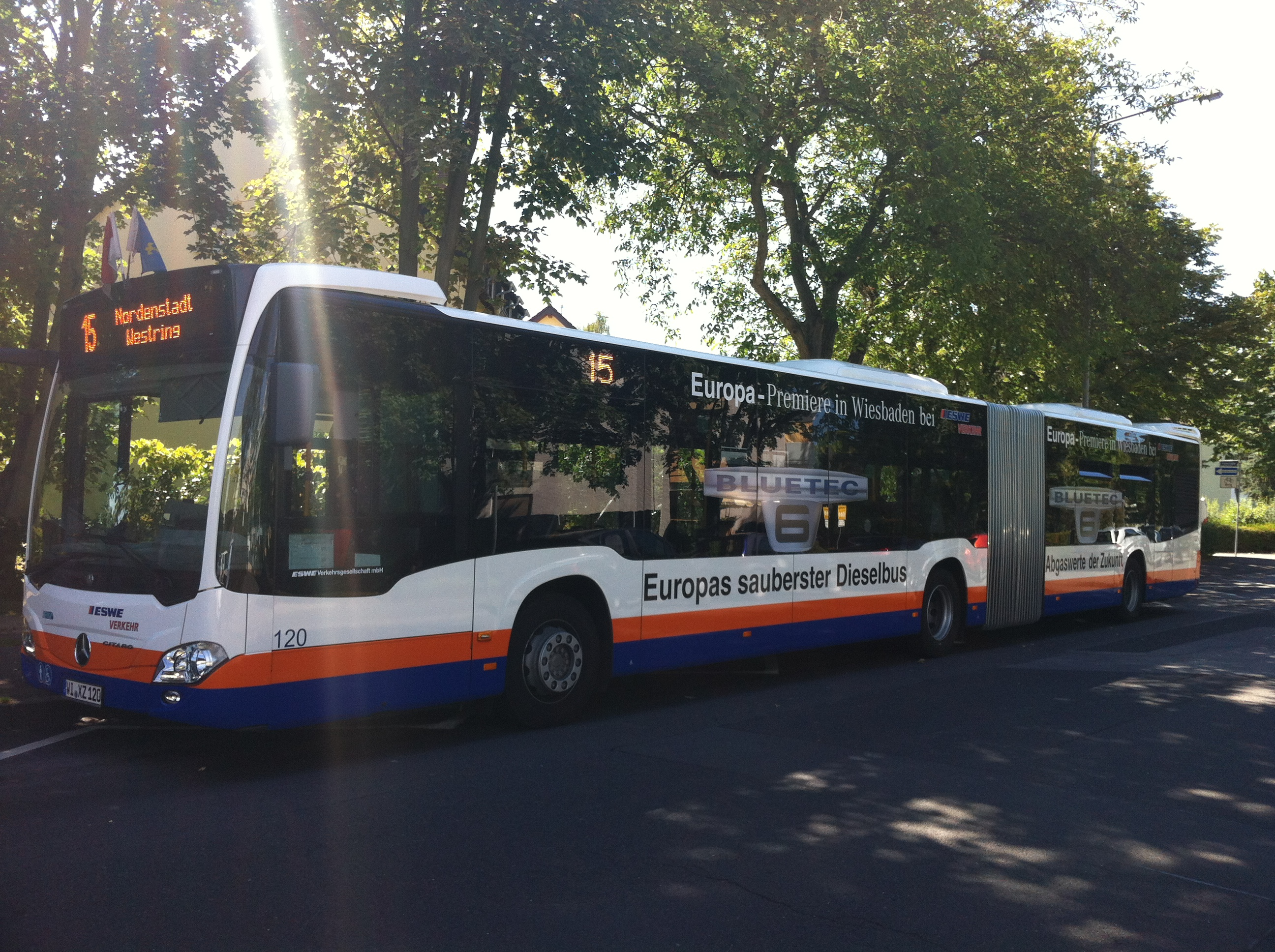 Erster Euro 6 Linienbus in Europa, Premiere 2012 bei ESWE Verkehr in Wiesbaden, hier Endhaltestelle Linie 15 Gräselberg Faaker Straße